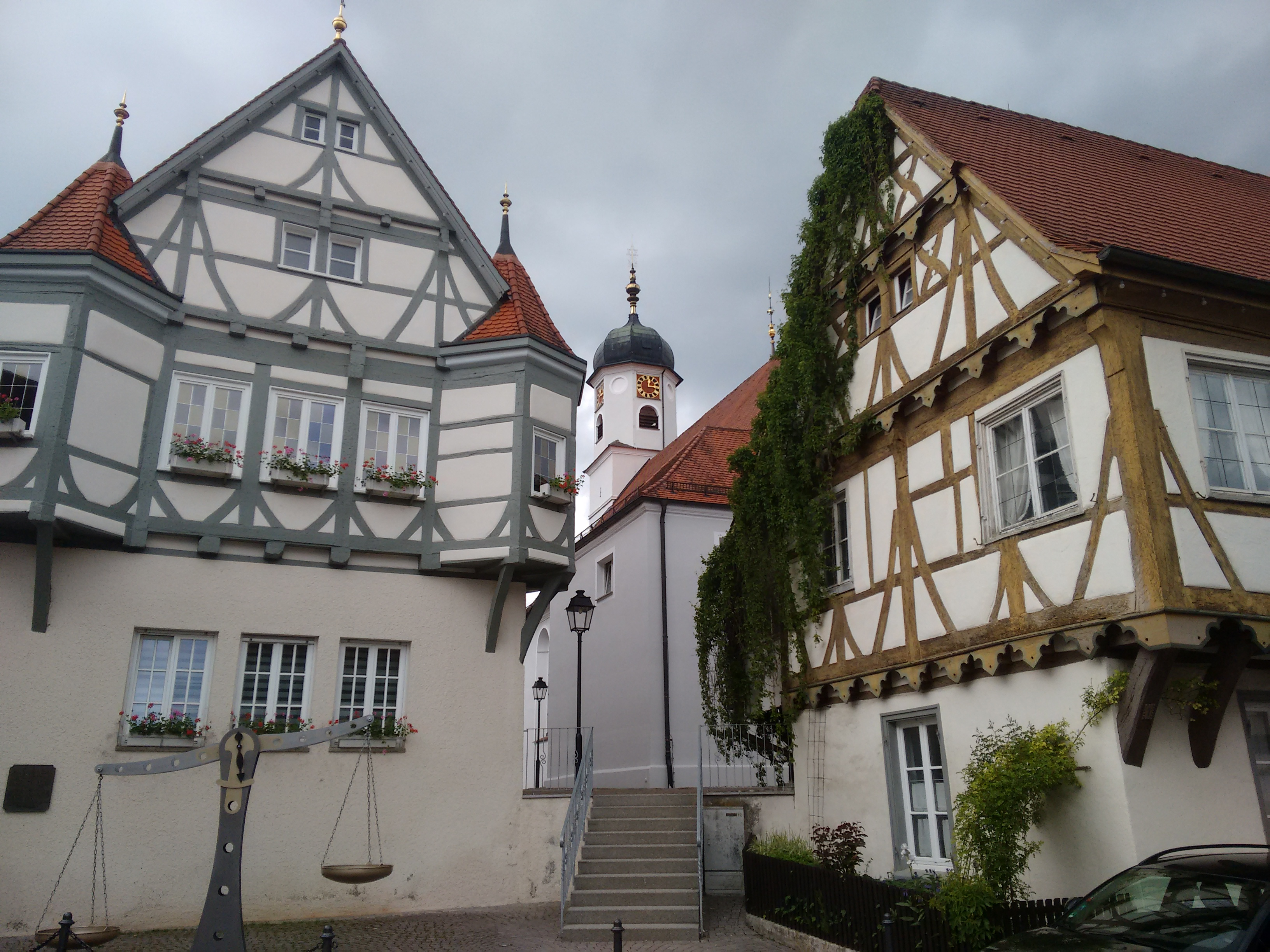 In der Innenstadt